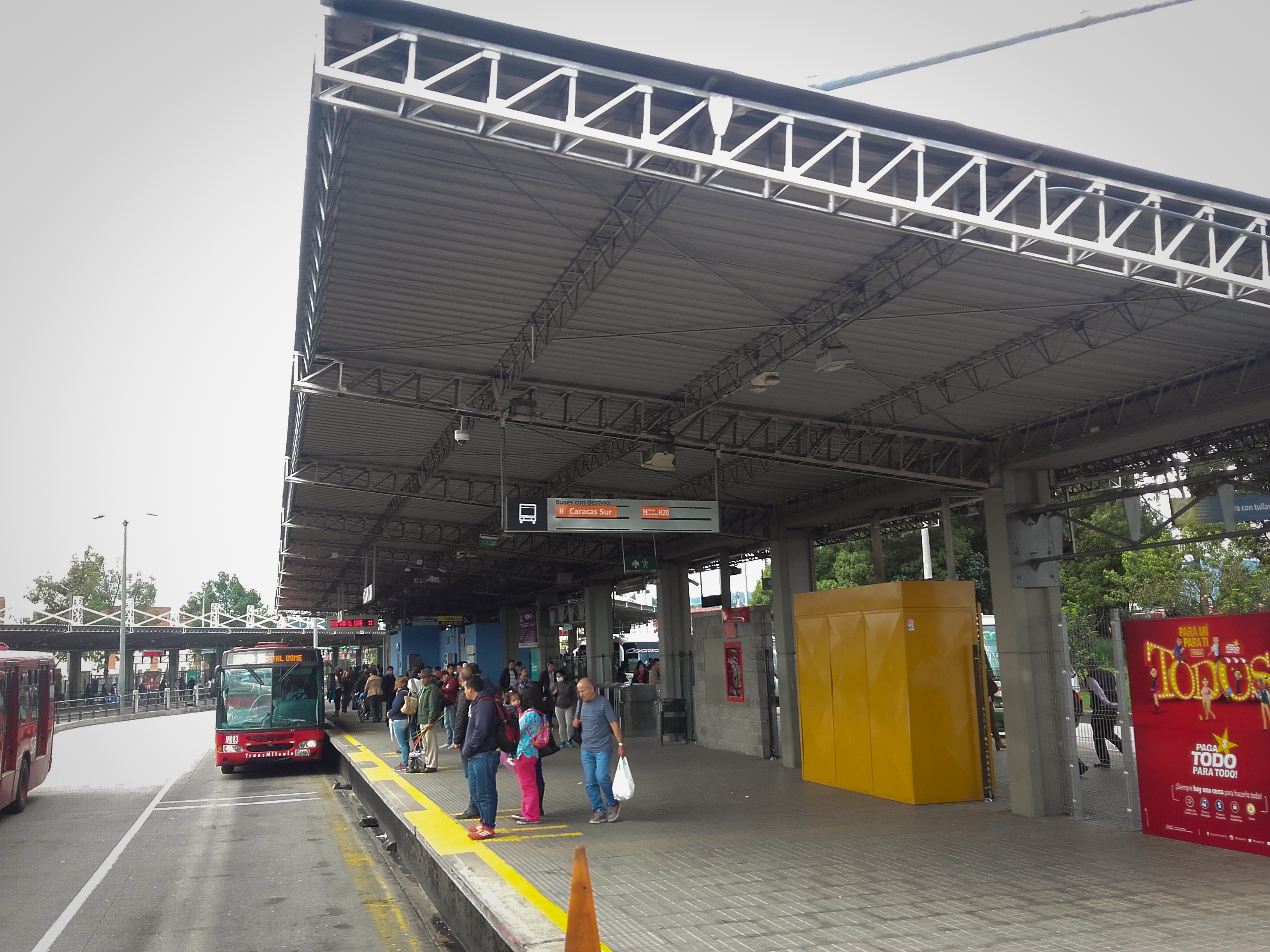 ndndkkddjkdkdkd